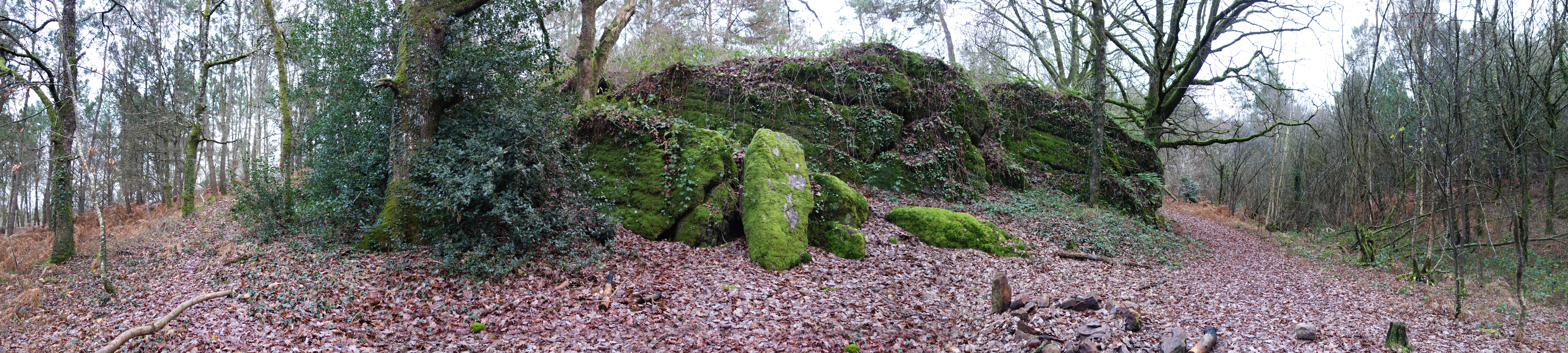 Près de Concoret, en Morbihan, en lisère de la forêt de Paimpont… Nous somme dans un lieu nommé le « Val des Fées »... Après avoir visité le célèbre « Chêne à Guillotin », nous continuons le chemin qui le contourne sur 1 kilomètre pour voir la « Maison de Jobard » et surtout le rocher du « Pas de la Chèvre »…